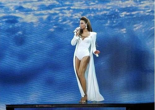 Beyonce durante el I am... Tour en Vancouver Canada